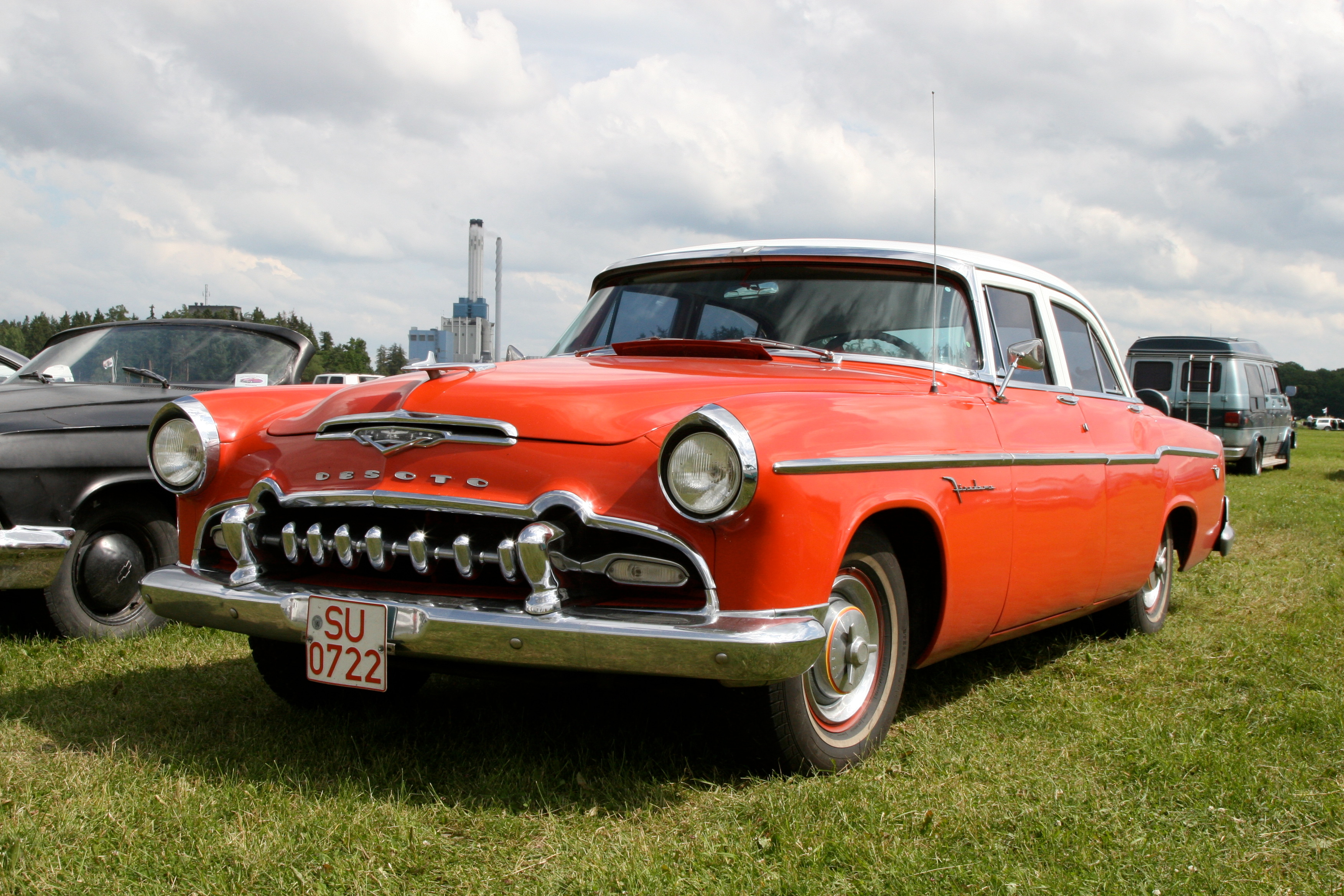 Power Big Meet, Västerås 2007